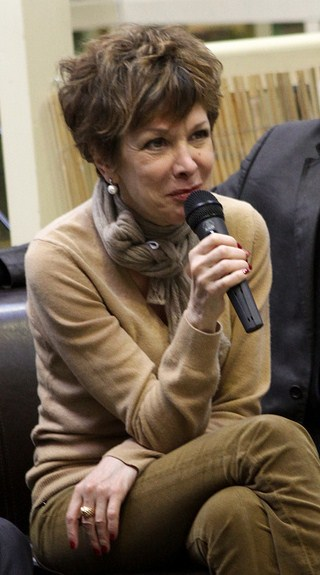 Catherine Laborde lors de la conférence de presse de lancement de la Vente généreuse sponsorisée en partenariat entre PriceMinister et La Chaine du Coeur (en présence des parrains des diverses associations).